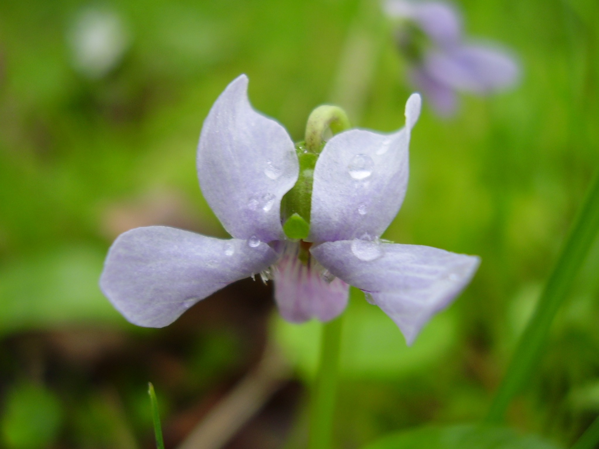 Viola palustris Photo taken by Käyttäjä:kompak (23rd of June 2005)